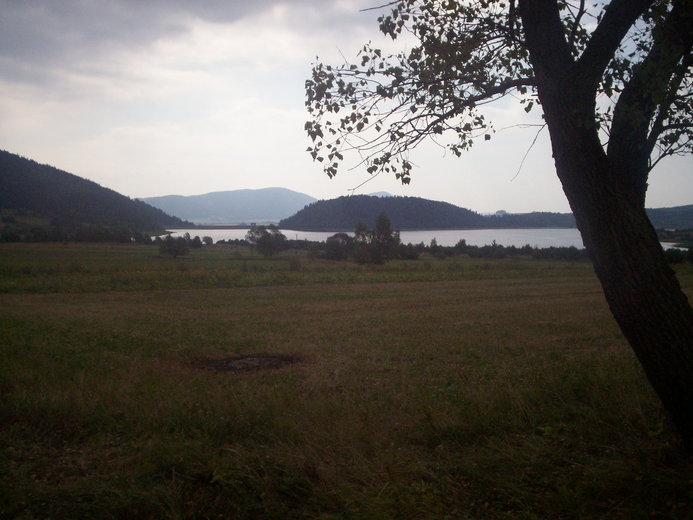 Zbiornik Bukówka.